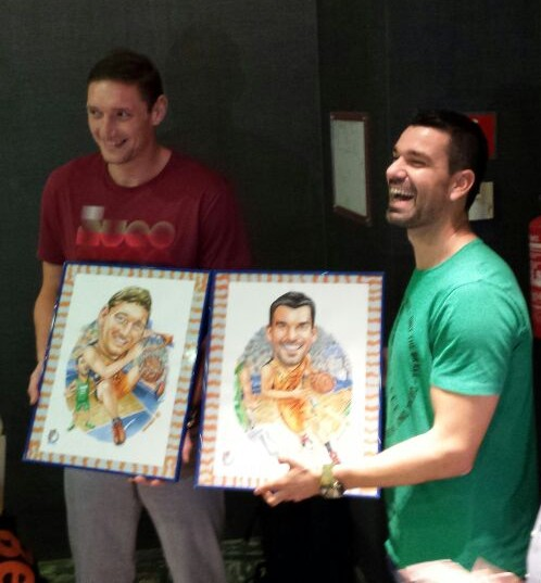 Sopar de penyes 2014.